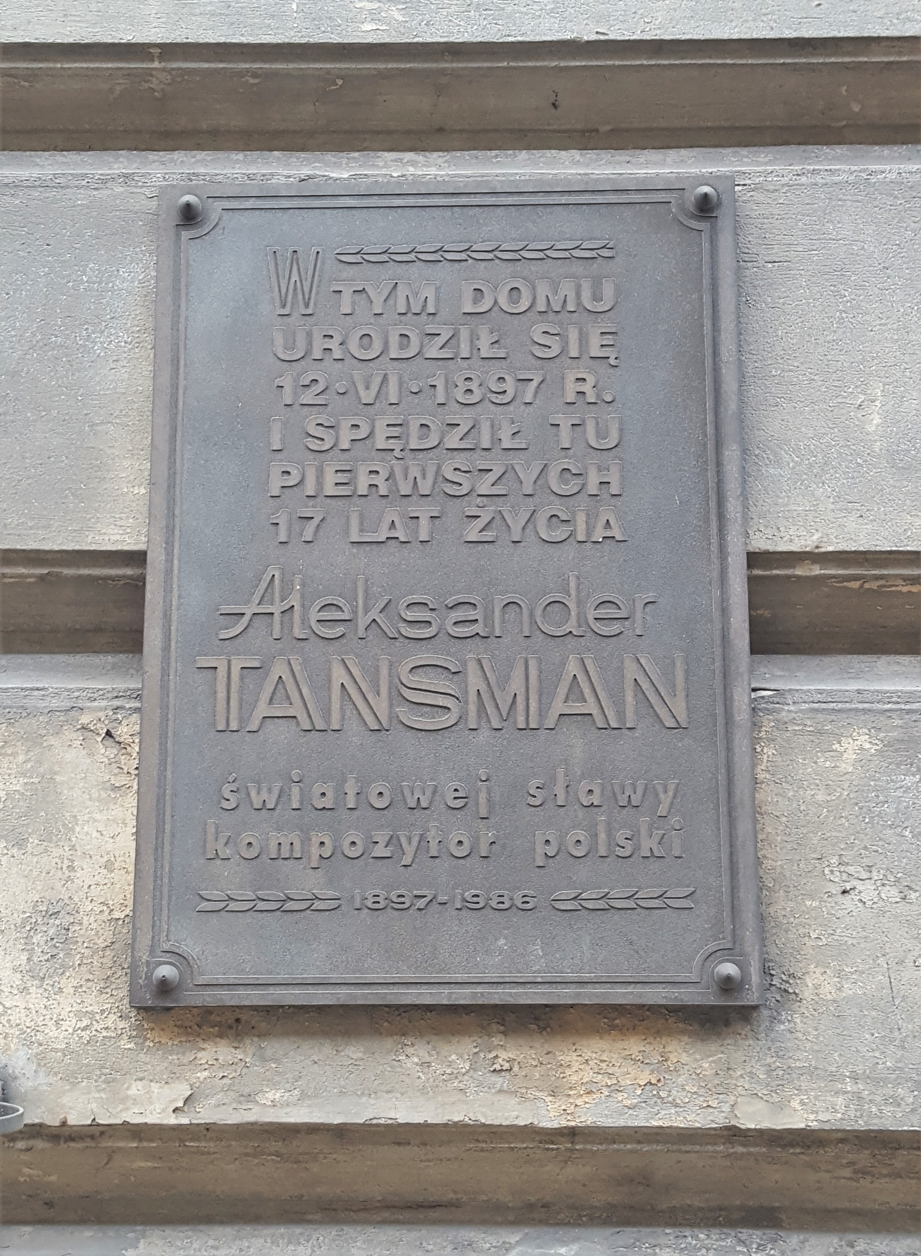 Tablica pamiątkowa na kamienicy w Łodzi, gdzie urodził się Aleksander Tansman